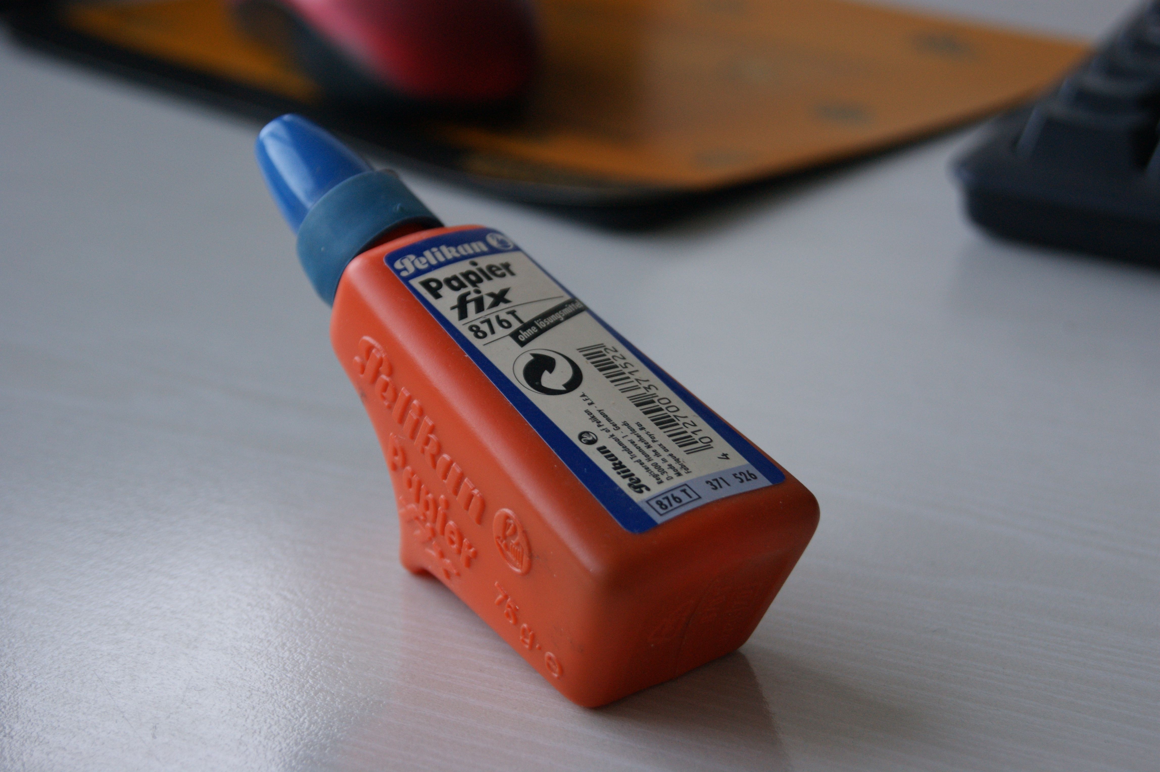 Klebstoffflasche